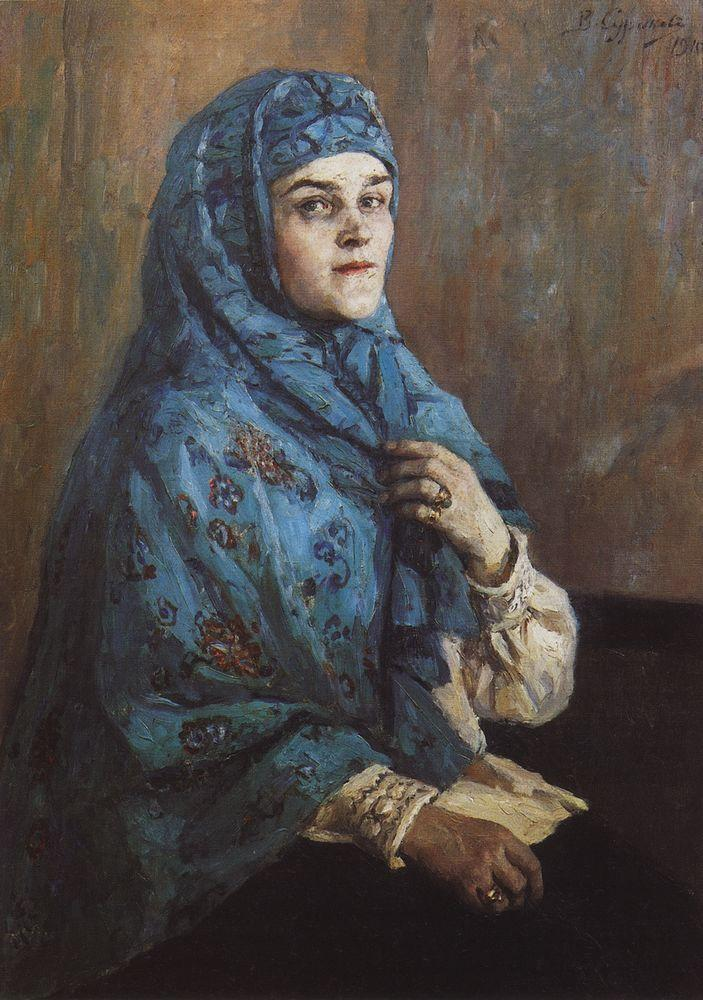 Василий Иванович Суриков (1848 - 1916) «Портрет княгини П.И.Щербатовой» 1910. Княгиня Щербатова Полина Ивановна (1880 - 1966)- жена князя Сергея Александровича Щербатова